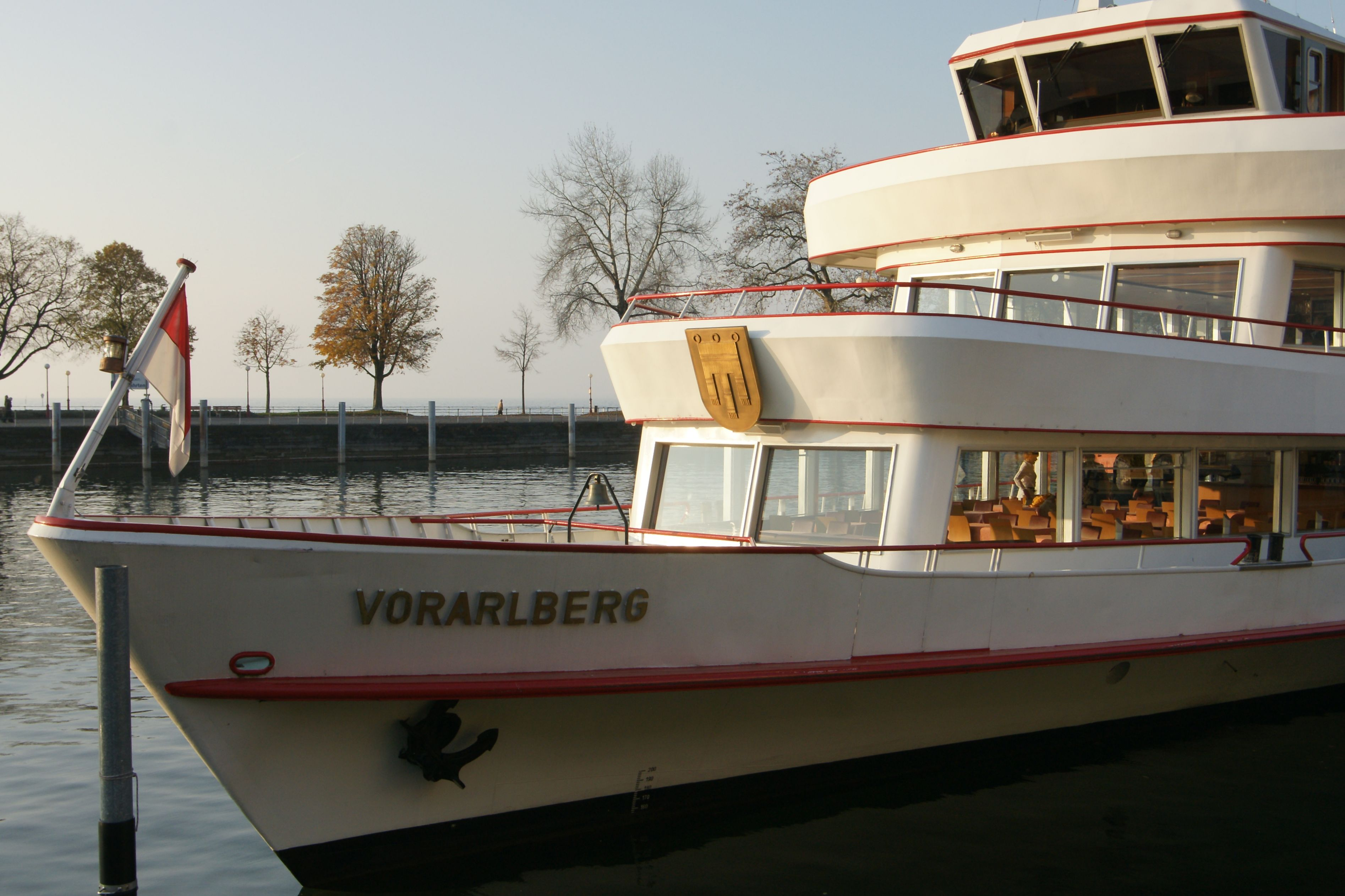 Die "Vorarlberg" im Bregenzer Hafen. *** Veröffentlicht: Gunnar Strunz in "VORARLBERG Mit Bregenzerwald, Großem Walsertal, Arlberg und Montafon ISBN 978-3-89794-280-6 2. Auflage 2014.